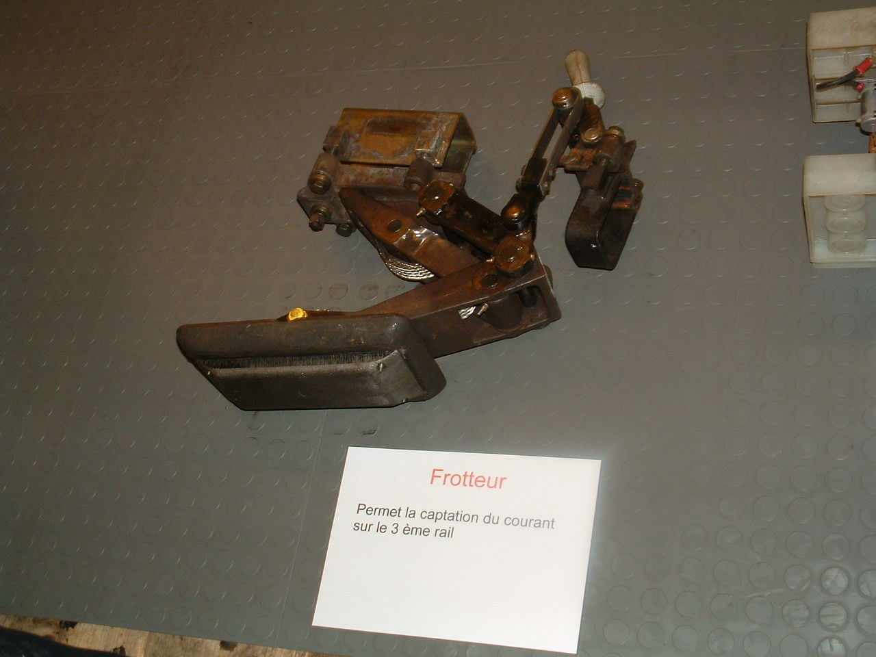 Frotteur 3ème rail d'un matériel roulant du métro de Paris